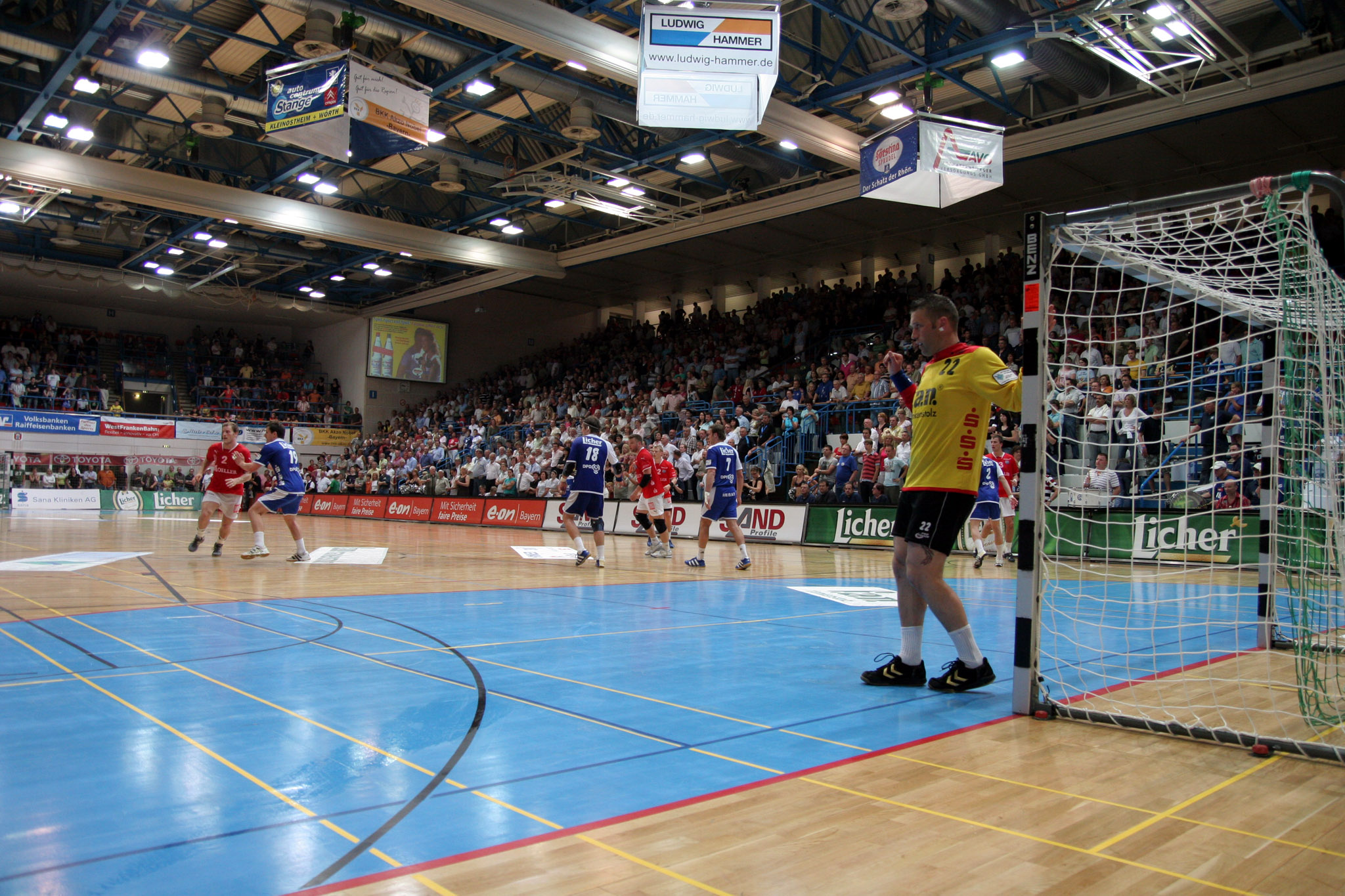 Die f.a.n. Frankenstolz Arena während des Handballspiels TV Großwallstadt - VfL Gummersbach am 14. Mai 2008